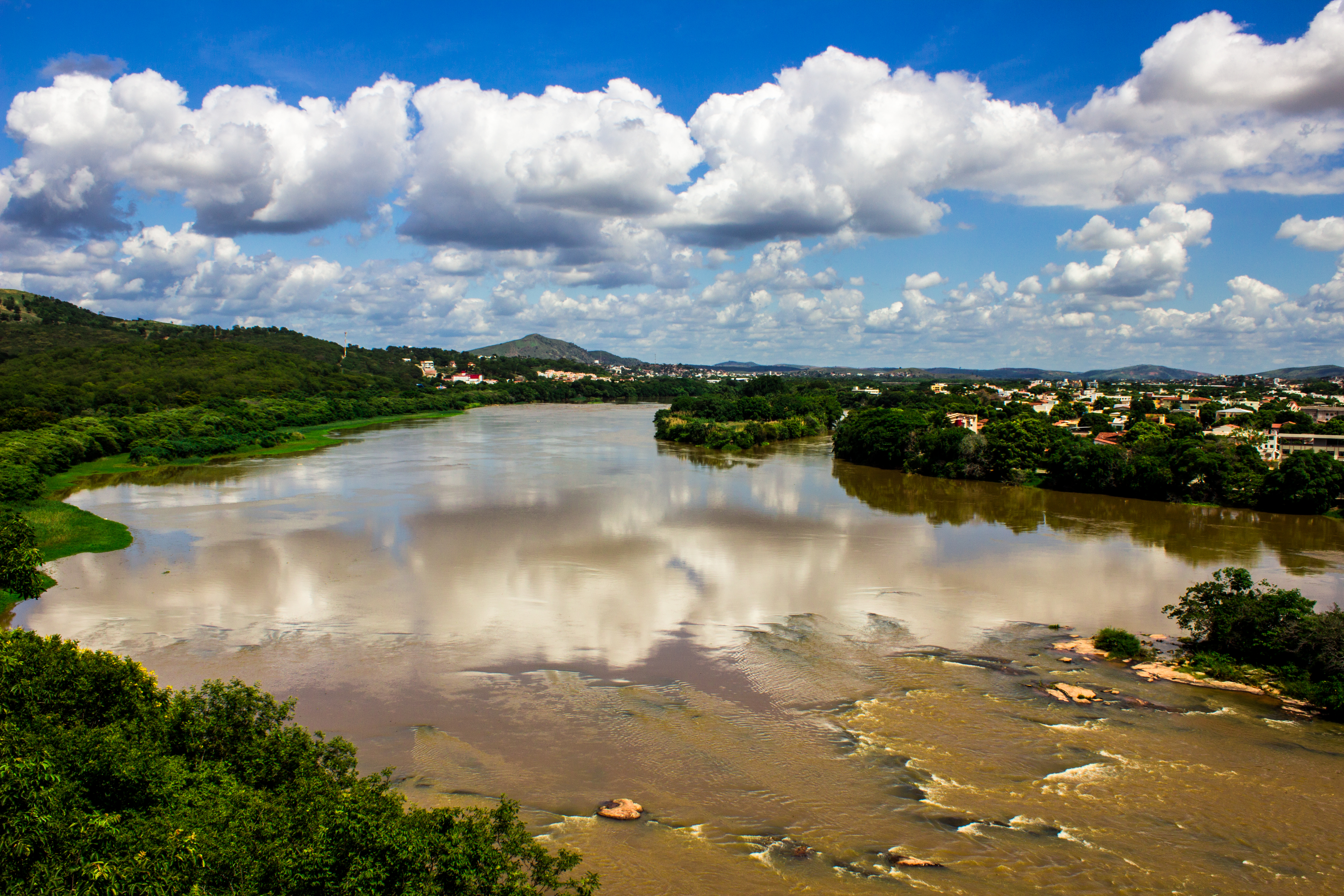 Vista do Rio Doce do mirante do Parque Municipal, localizado no bairro Elvamar, no pé do Pico da Ibituruna